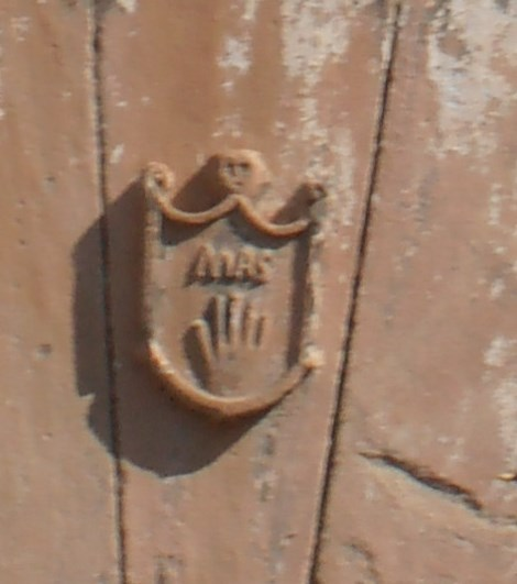 Can Carreter (Escut)